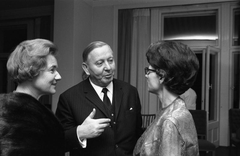 Landesvertretung Hamburg gibt Konzert u. Empfang (Bm Niederalt)